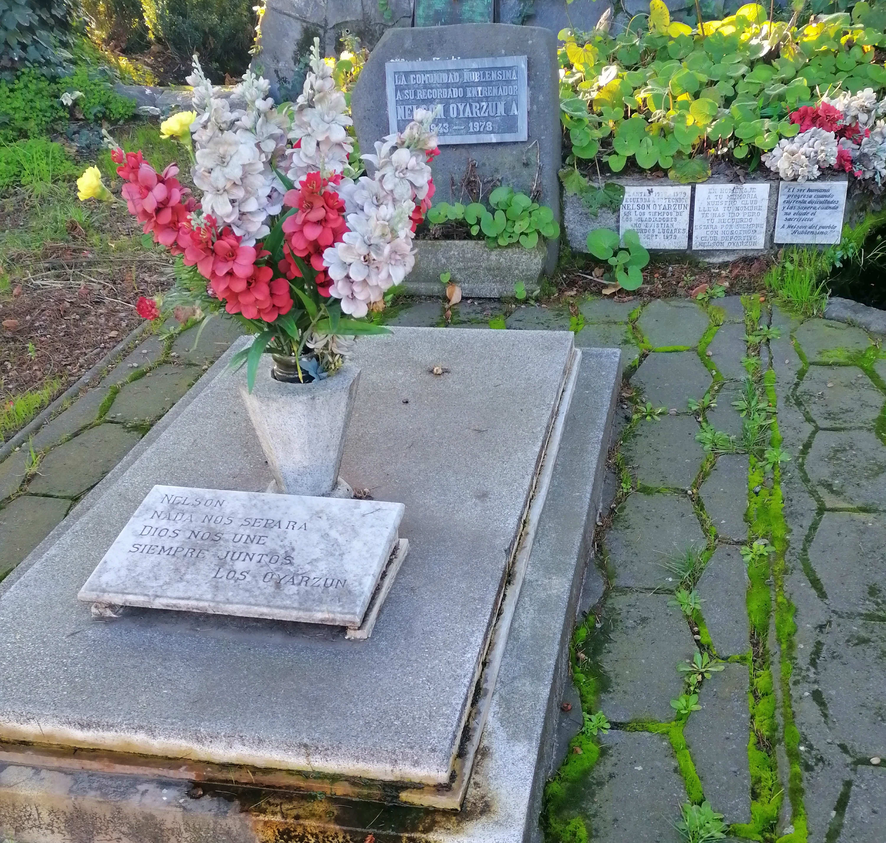 Tumba del entrenador de fútbol chileno Nelson Oyarzún Arenas, en Chillán, Chile